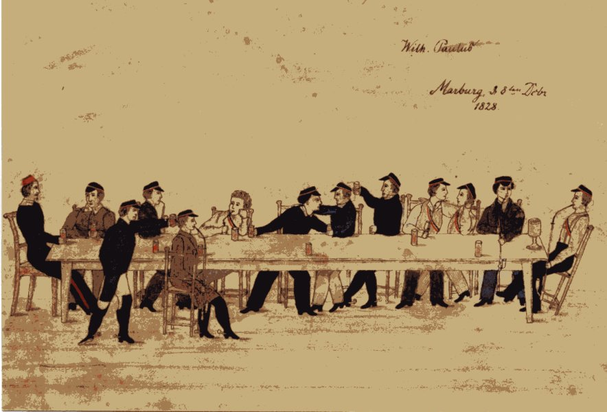 Kneiptafel Marburger Burschenschafter, Zeichnung von 1828, Rechte abgelaufen, Public Domain